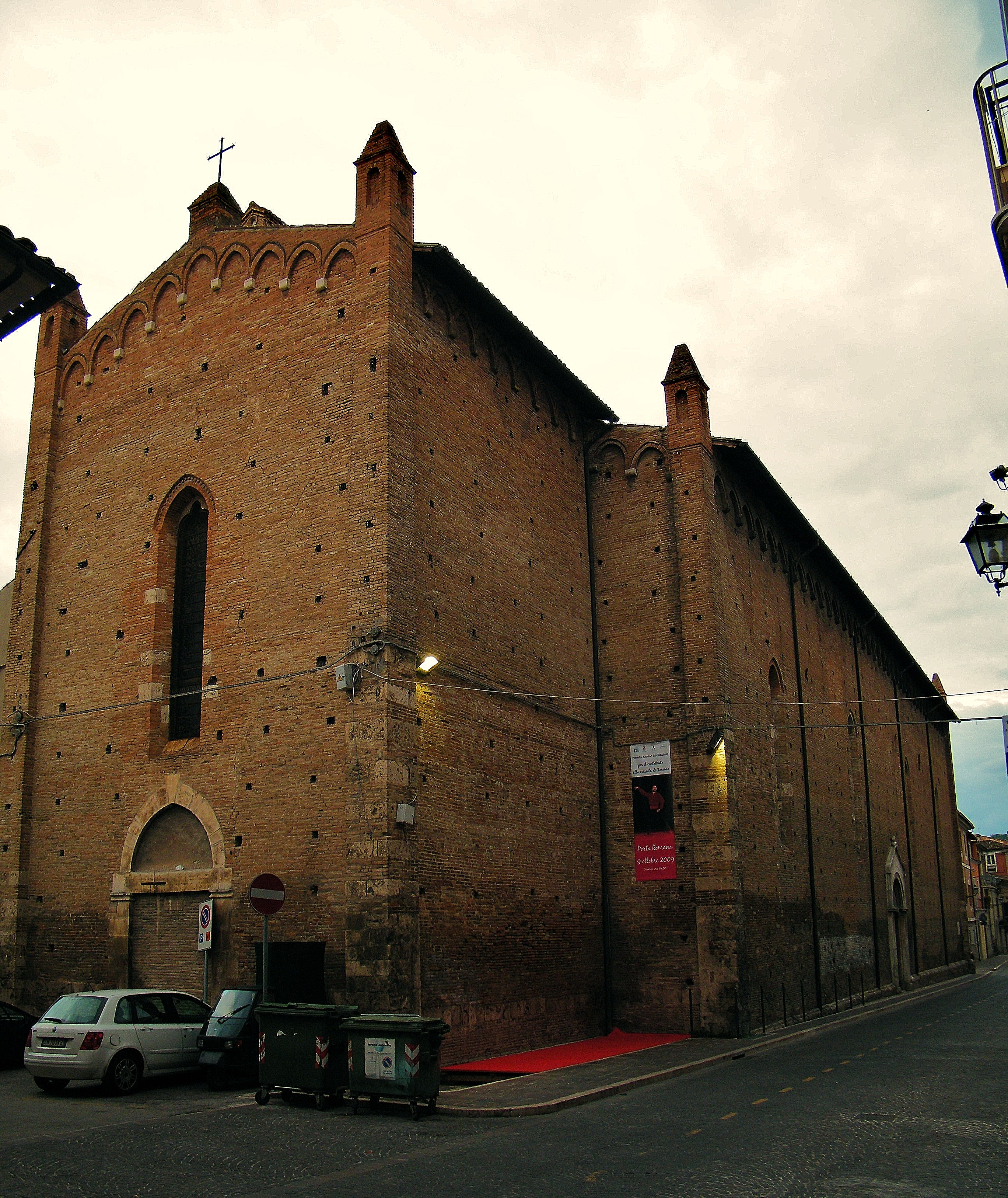 Chiesa di San Domenico (XIII sec.) in Corso Porta Romana.